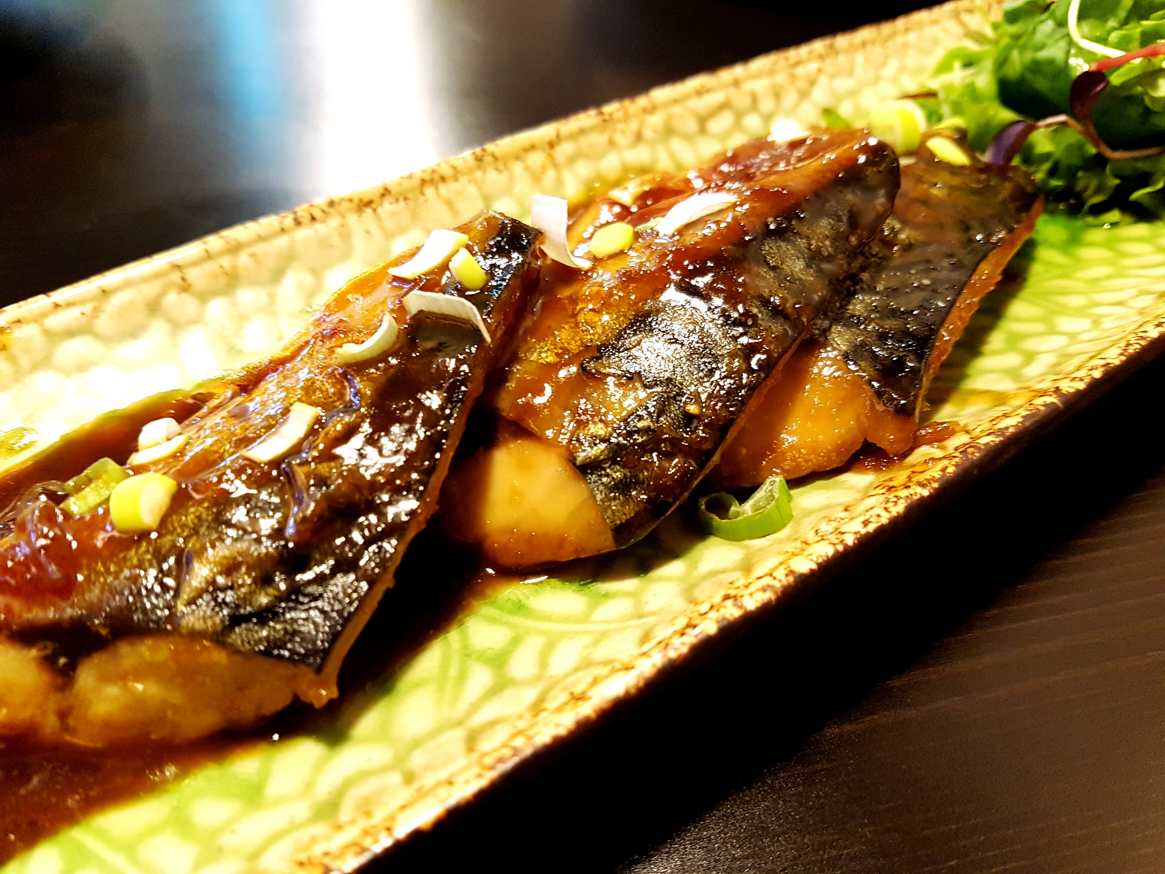 고등어 된장조림